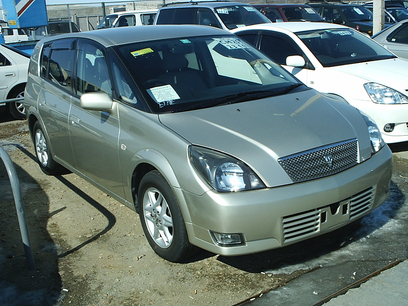 Toyota Opa 2000